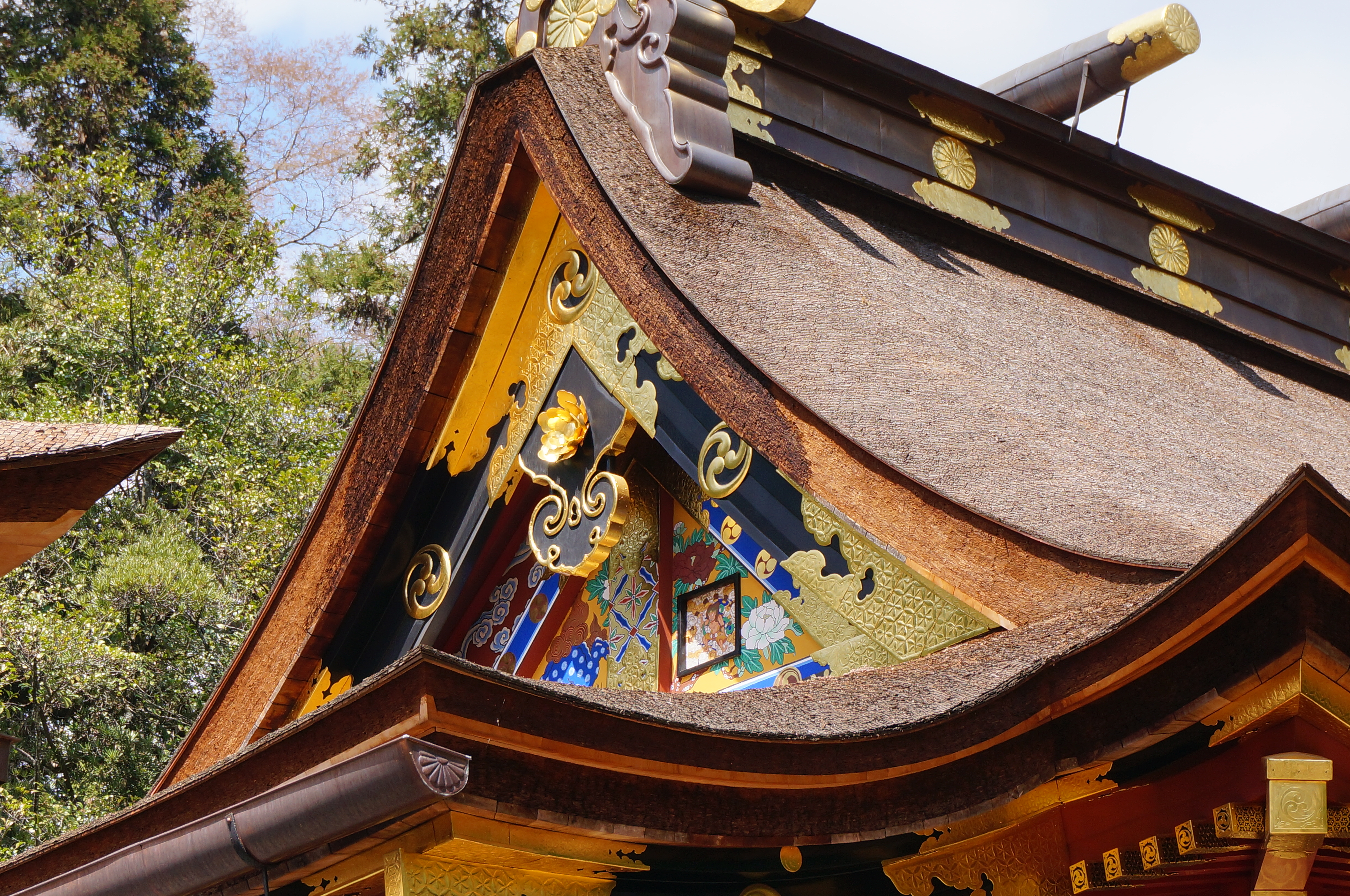 貫前神社本殿雷神小窓